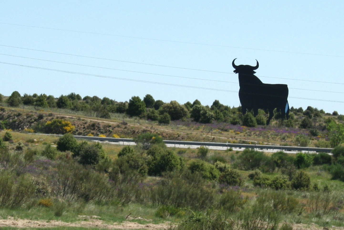 Toro de Osboene en el Término Municipal de Cabanillas de la Sierra